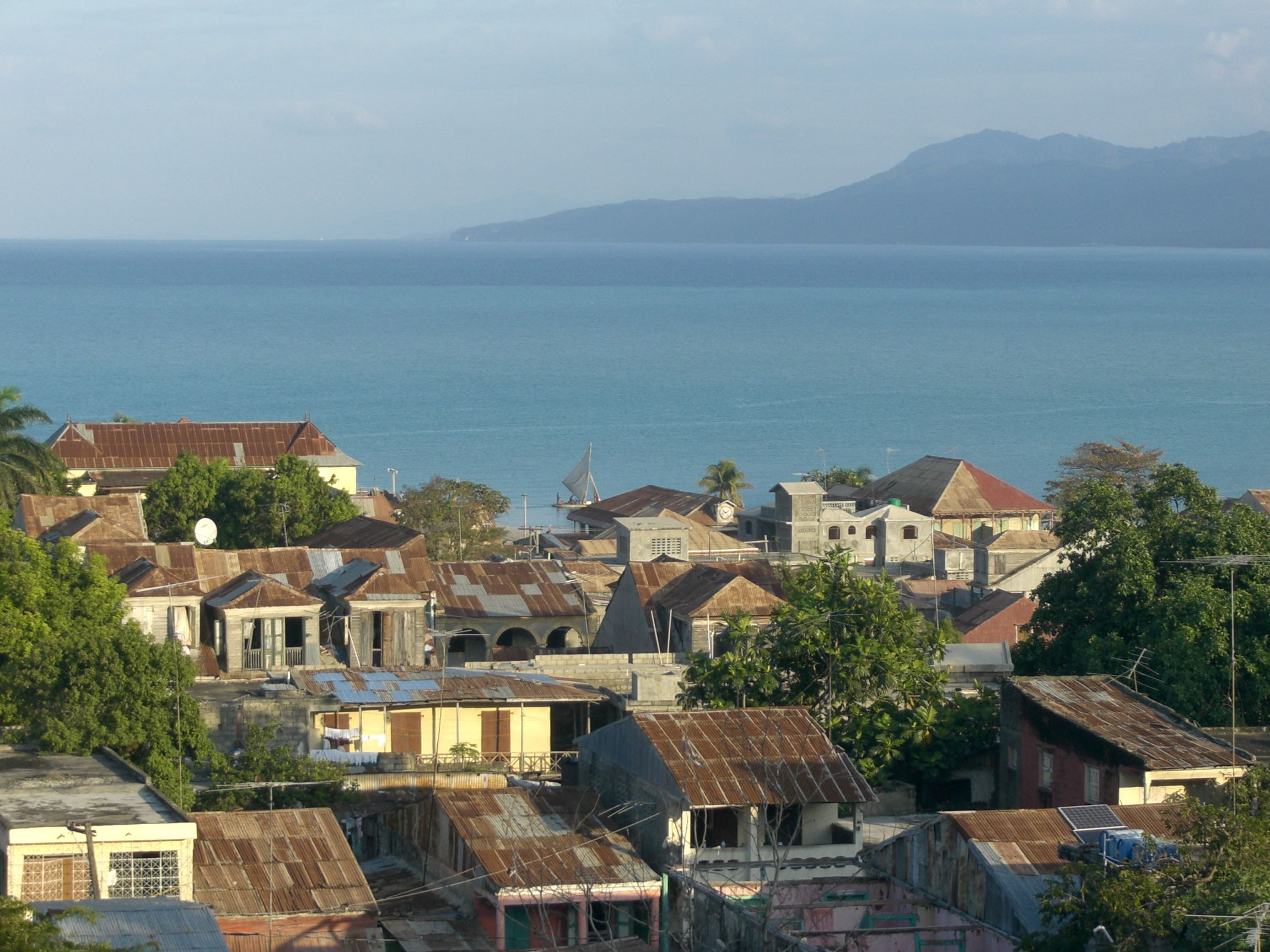 Jérémie, Haiti